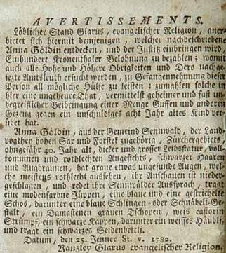 NZZ vom 9.2.1782